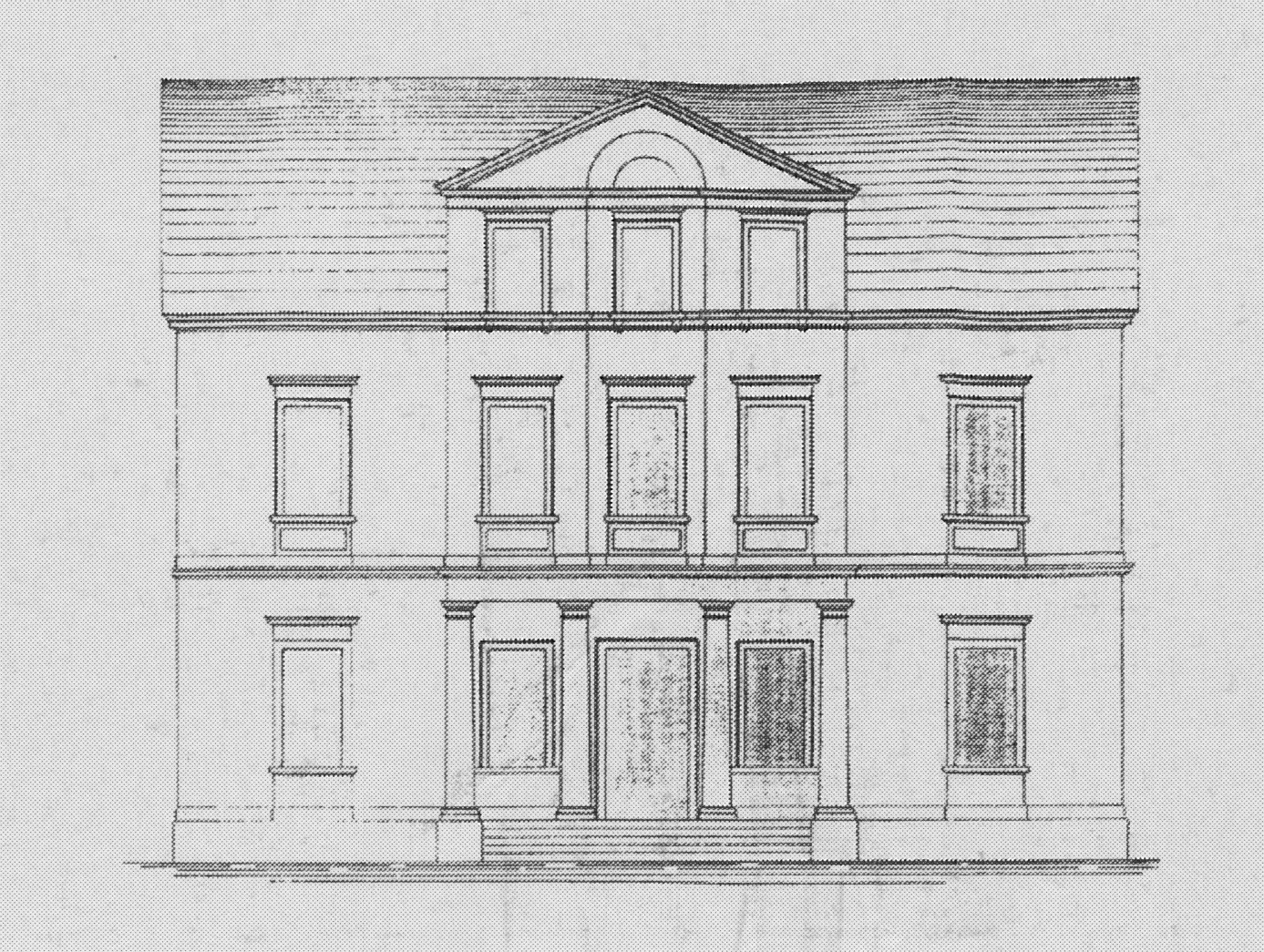 Radebeul Heinrich-Zille-Straße 61 Bauzeichnung 1862